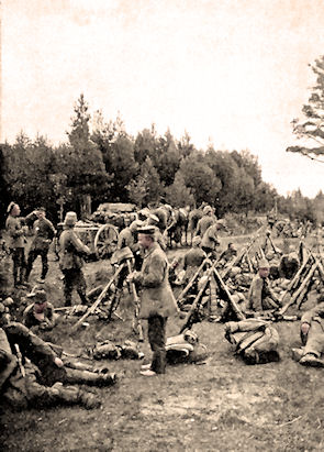 Jääkäripataljoona 27 pataljoonaharjoituksen tauolla Lockstedt Lagerissa hieman ennen rintamalle siirtymistä vuonna 1916.